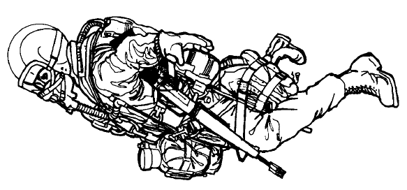 Freifallspringer mit MC-3-Freifallsystem des US Militärs mit Waffe und Gepäck. Bild aus Field Manual 31-19 von 1977